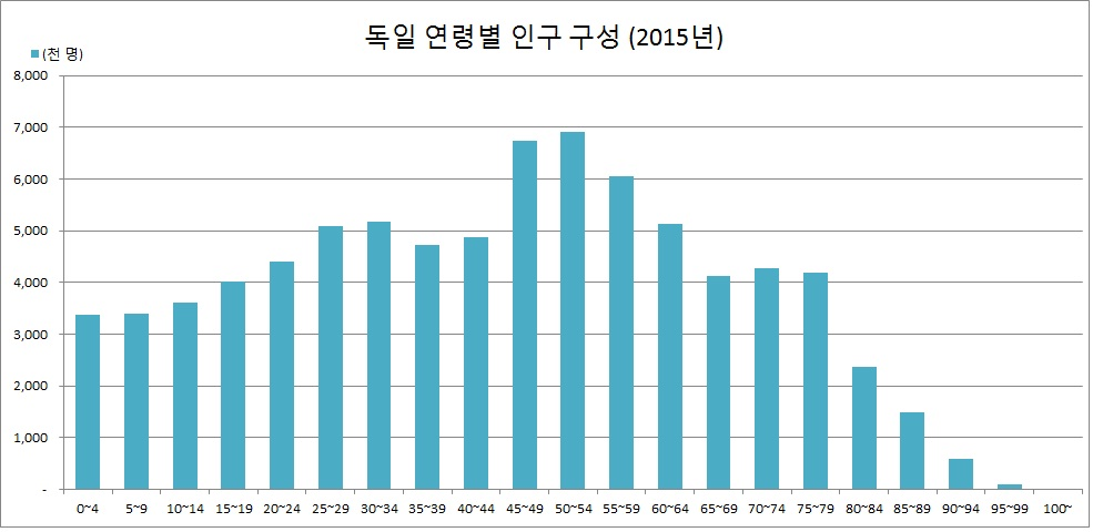 독일 연령별 인구 구성(2015년)